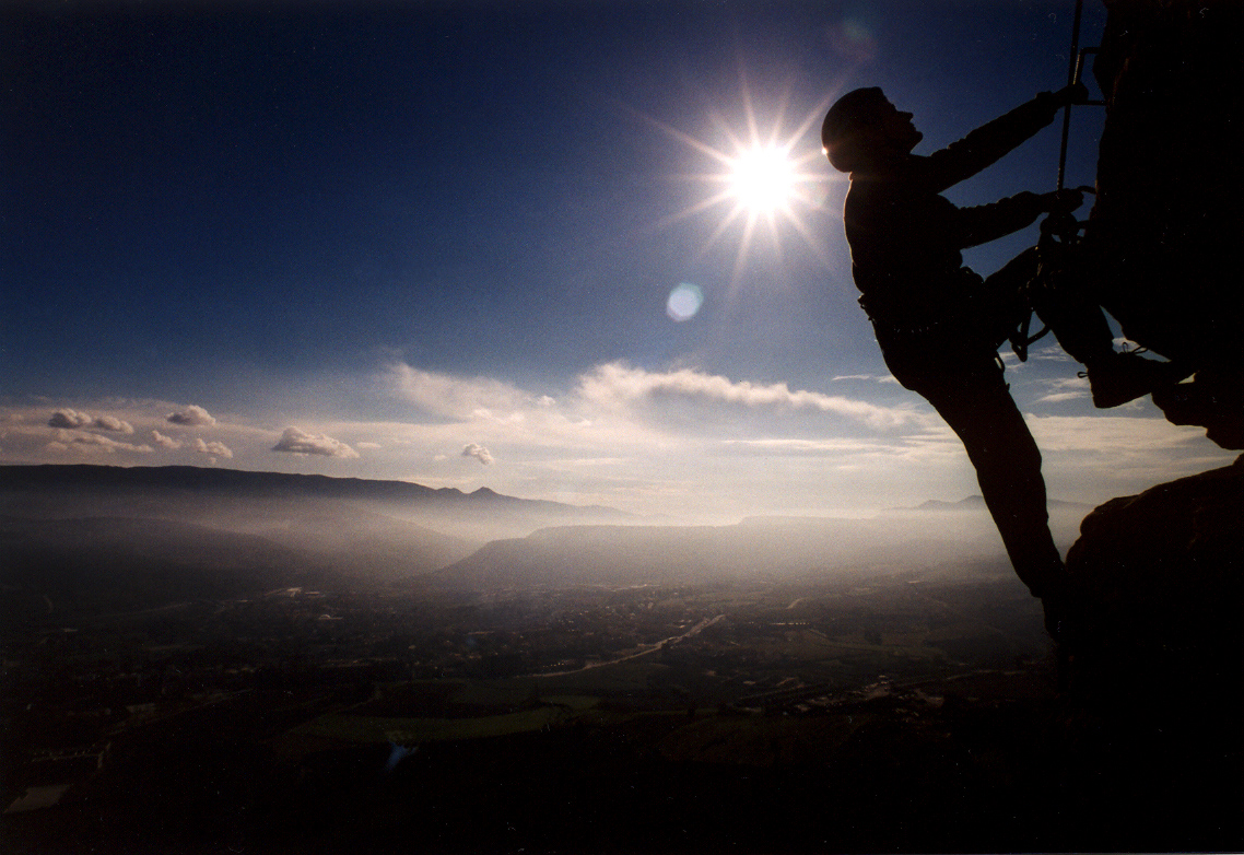 Maria Rosa Aregall al Quicarell